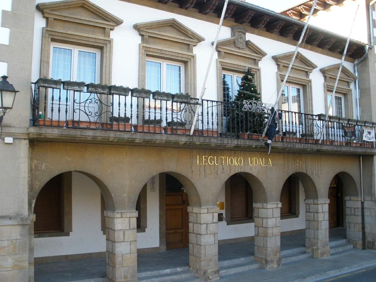 Ayuntamiento de Legutio (Álava)